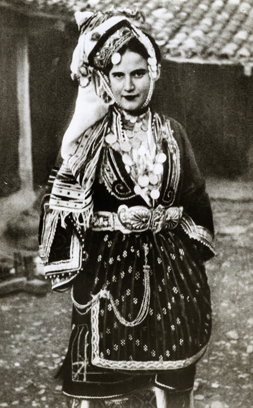 Φωτογραφία γυναίκας με νυφική φορεσιά από την Επισκοπή Ημαθίας. Μακεδονία. Αρχές 20ού αιώνα. Φωτογραφικό Αρχείο Πελοποννησιακού Λαογραφικού Ιδρύματος, Ναύπλιο